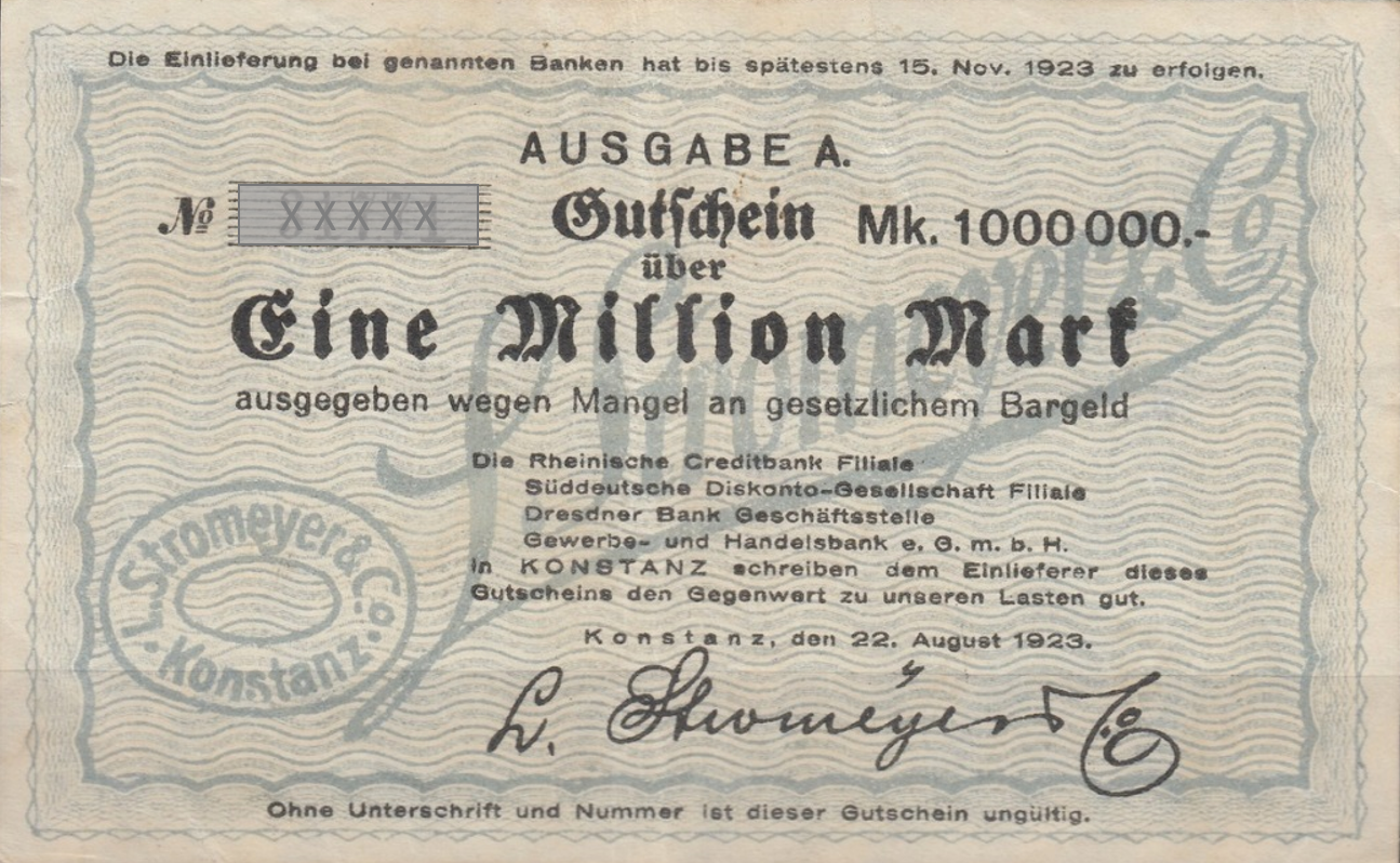 Deutschland (D) - Baden-Württemberg (BW) - Landkreis Konstanz (KN) - Konstanz: Notgeldschein der "Stromeyer u. Co.", 1 Millionen Mark